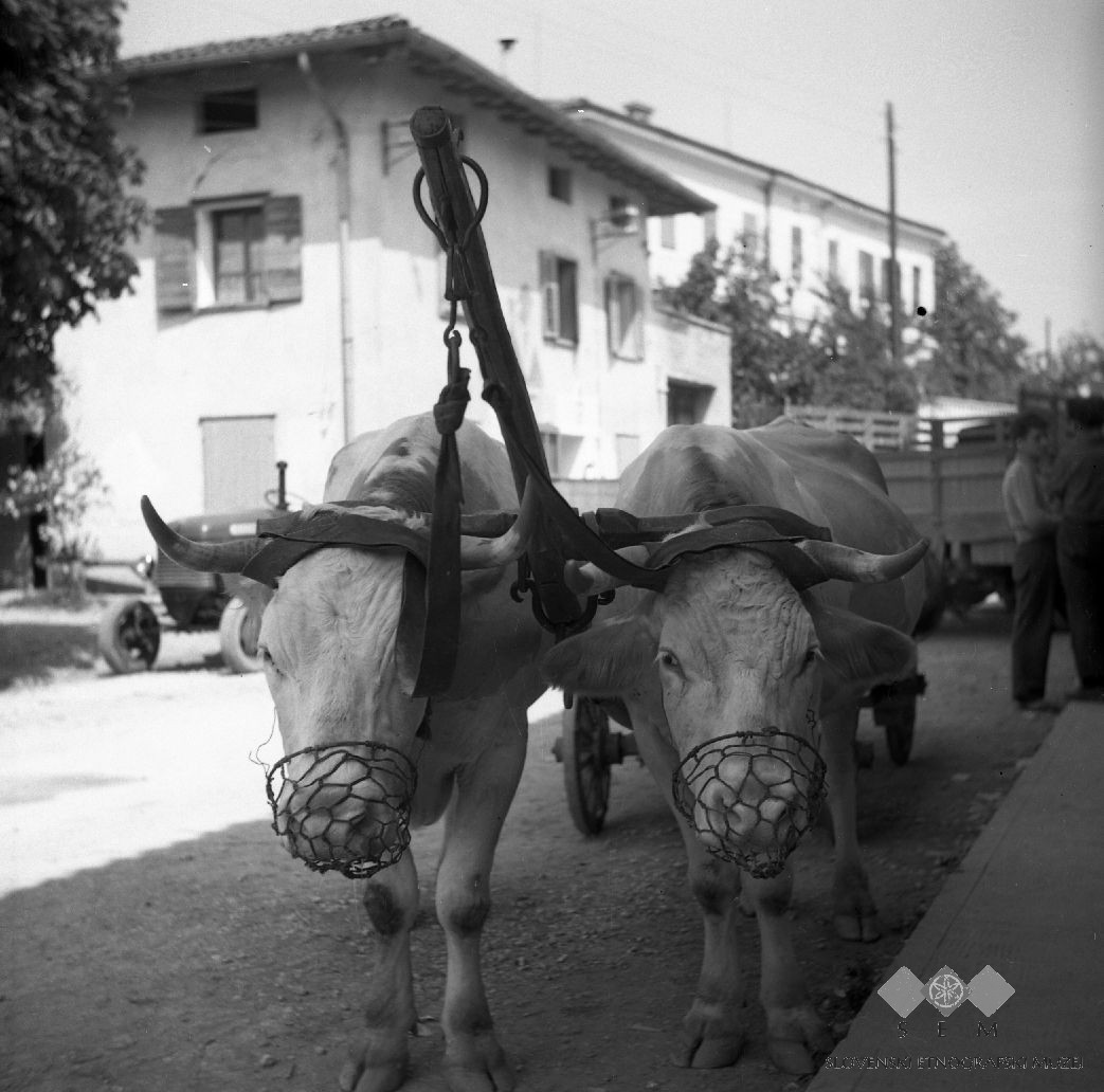 Volovska vprega z jarmom in "čeveštrom" (zavora) na ojeh, Hruševlje.